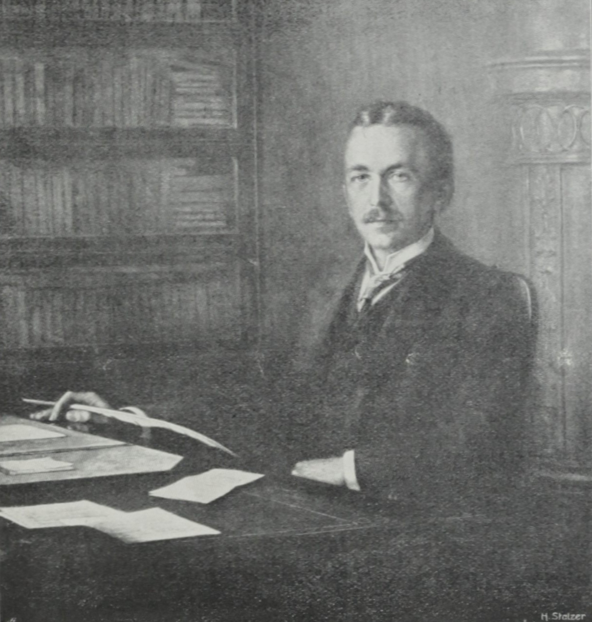 Julius Meinl II. (1869–1944). Fotografie eines Gemäldes von Hans Stalzer